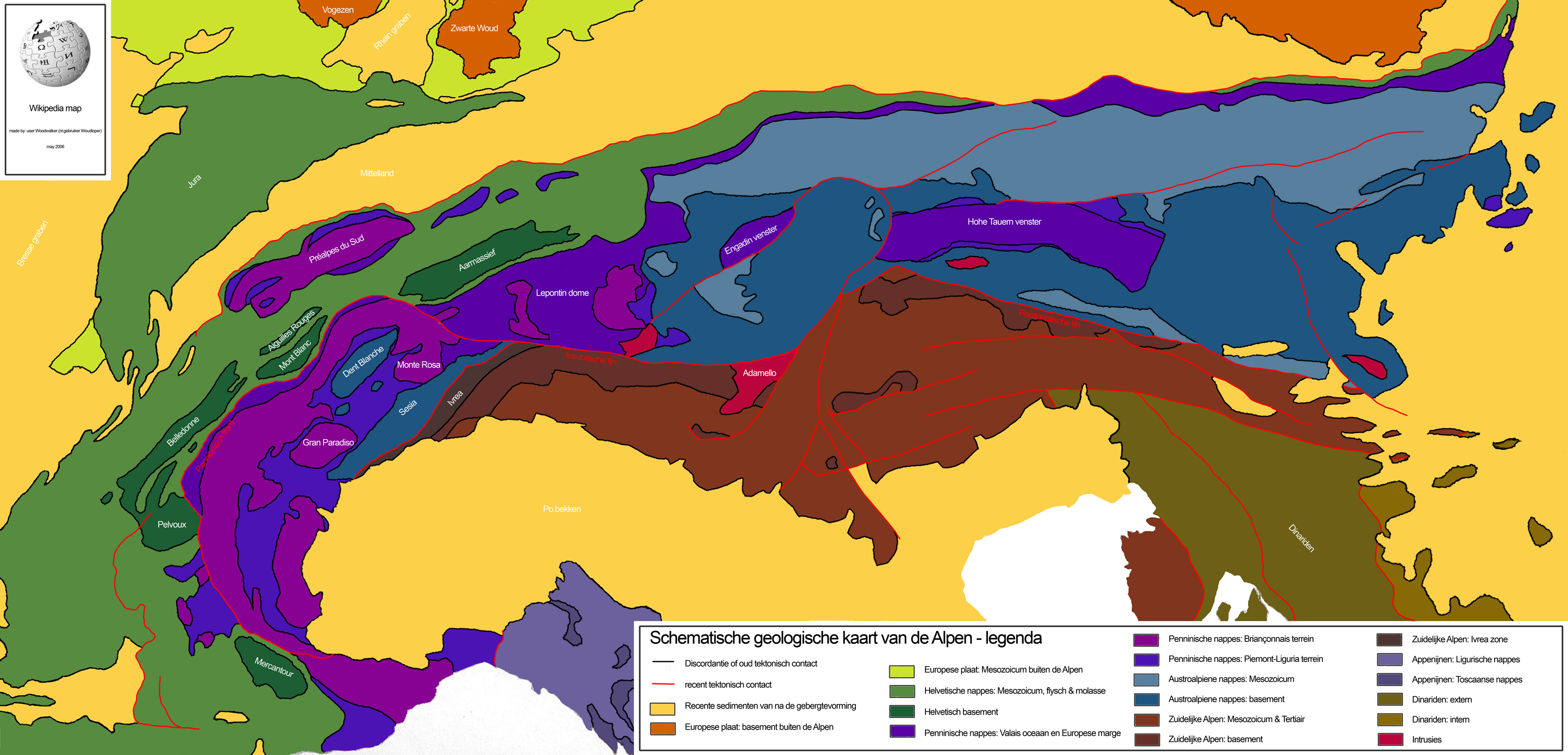 Zelf getekend